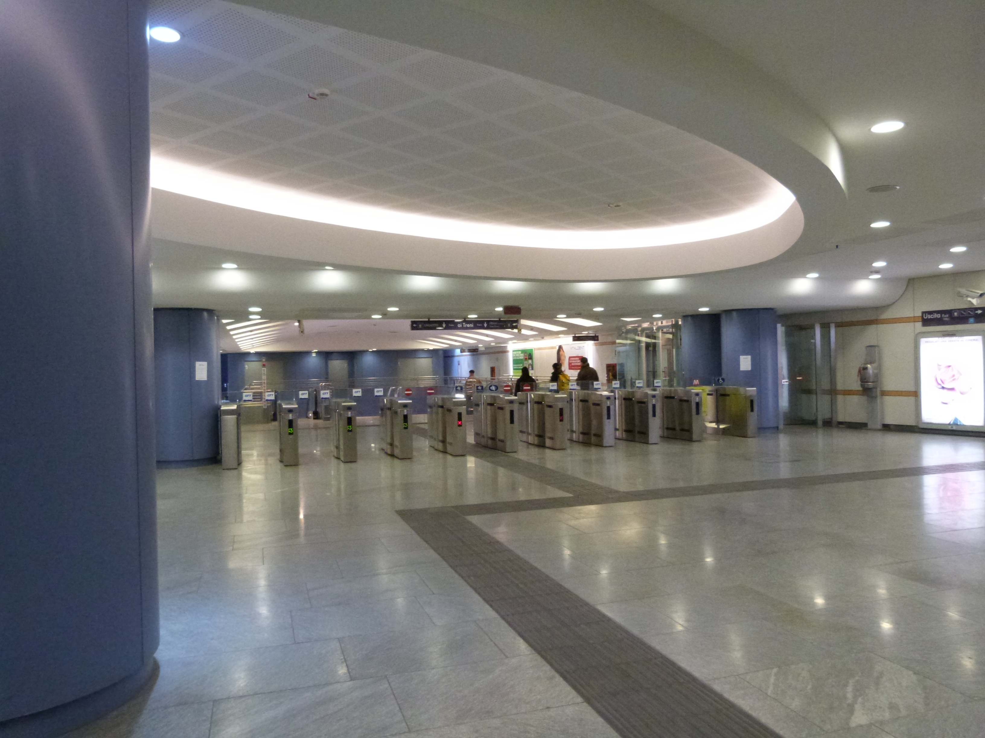 Stazione della metropolitana di Torino, fermata Spezia.Piemontèis: Metropolitan-a ëd Turin, stassion ëd Spessia.